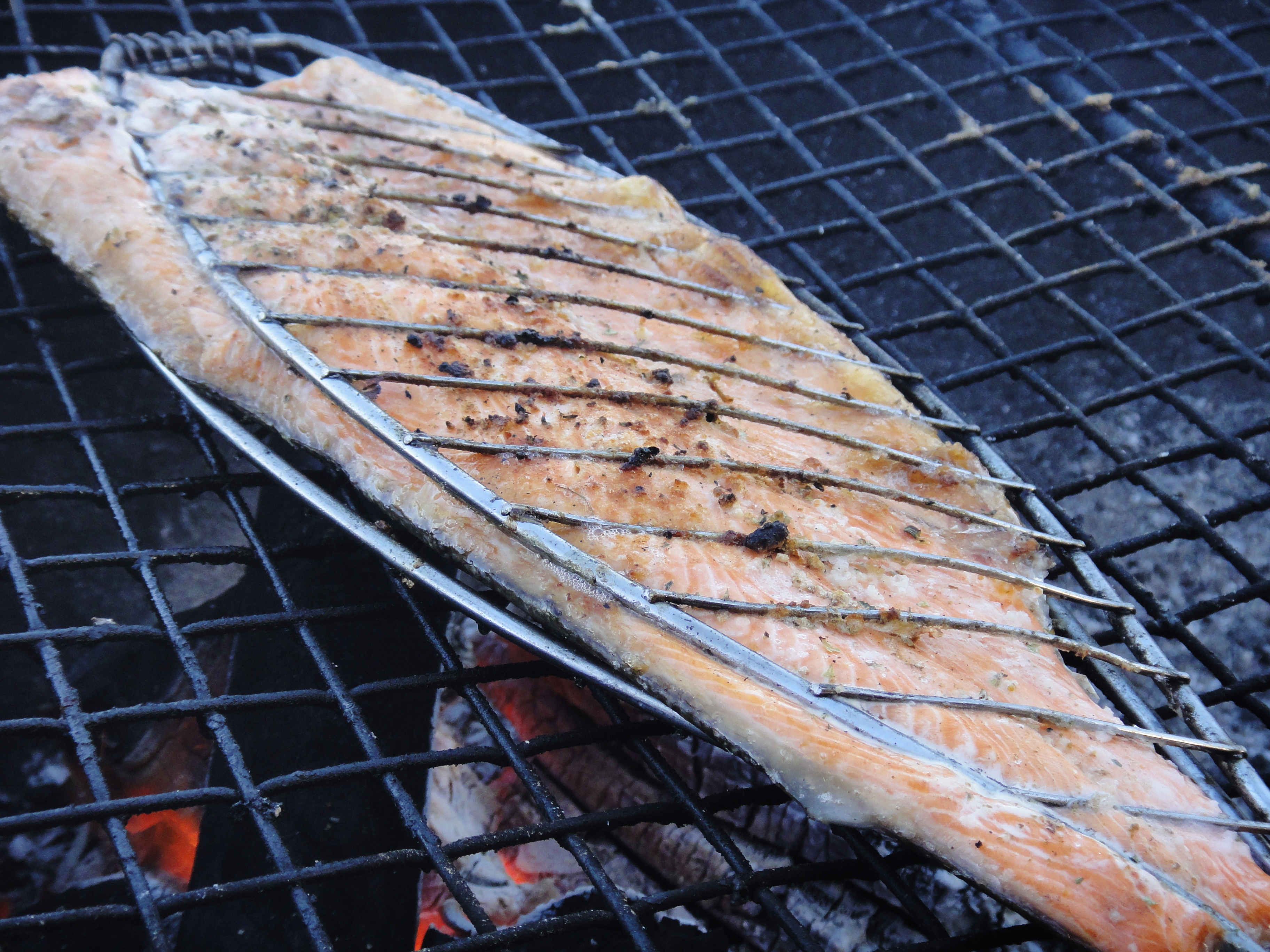 Preparación Salmón al Cancato, Hornopirén, Región de los Lagos, Chile.